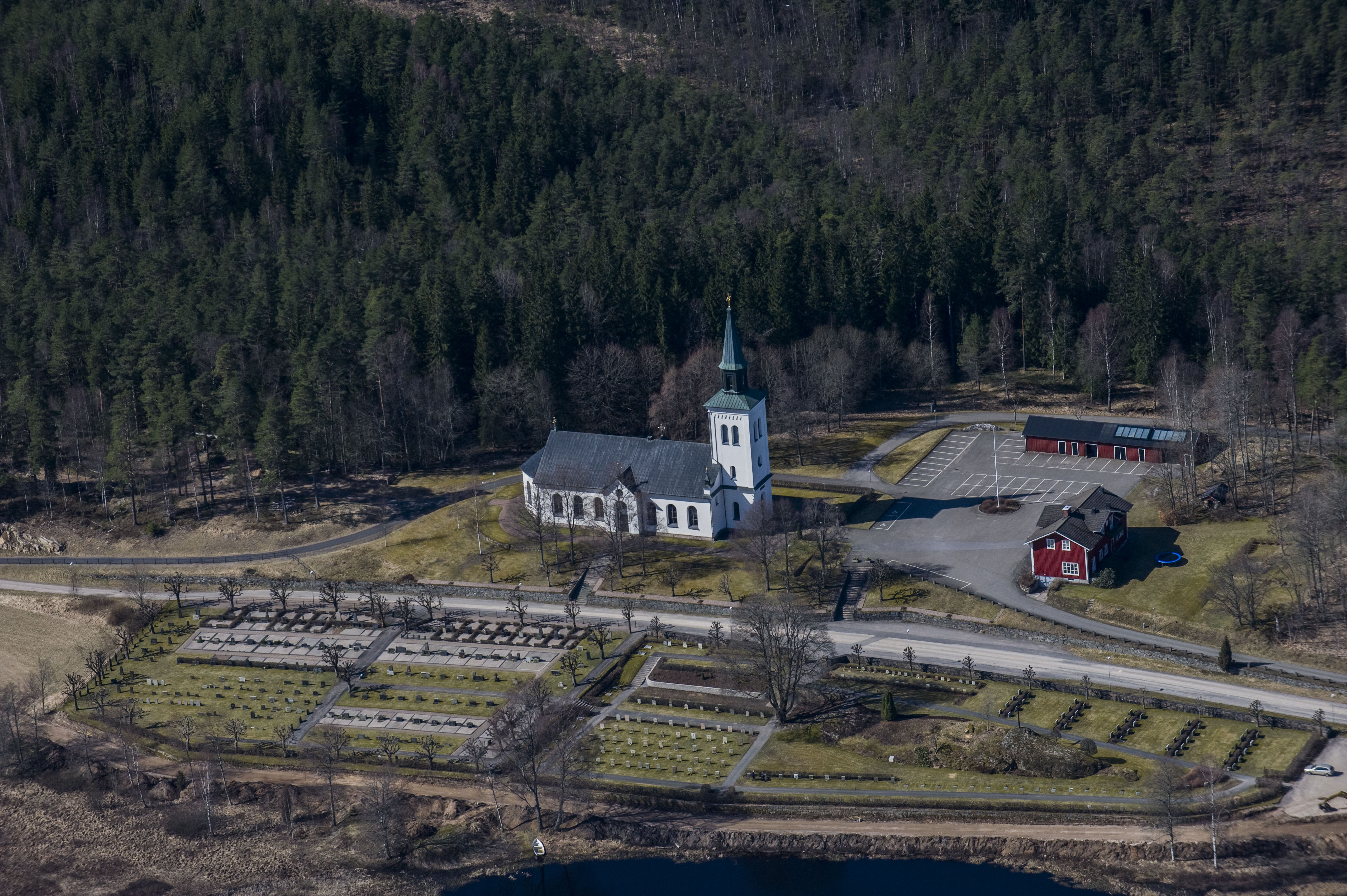 Gnosjö kyrka från luften